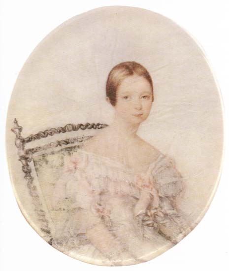 Самарина Мария Федоровна (1821-1888), сестра Ю.Ф.Самарина, замужем за графом Л.А.Соллогуб (1812-1852).